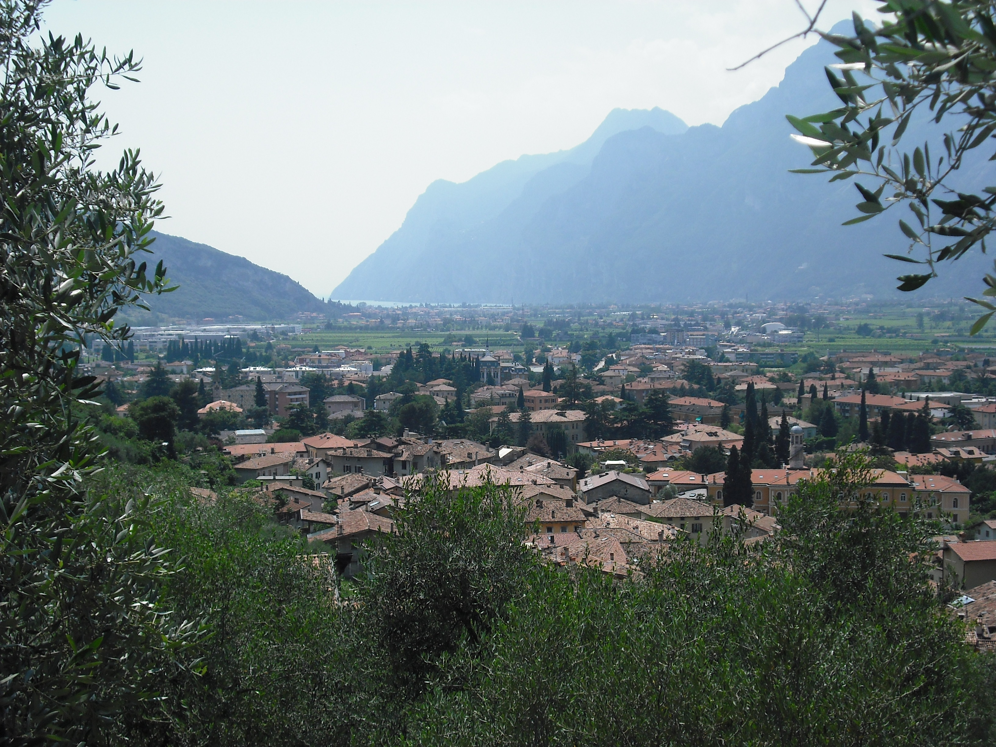 Veduta di Arco dall'omonimo castello, Trentino, Italia